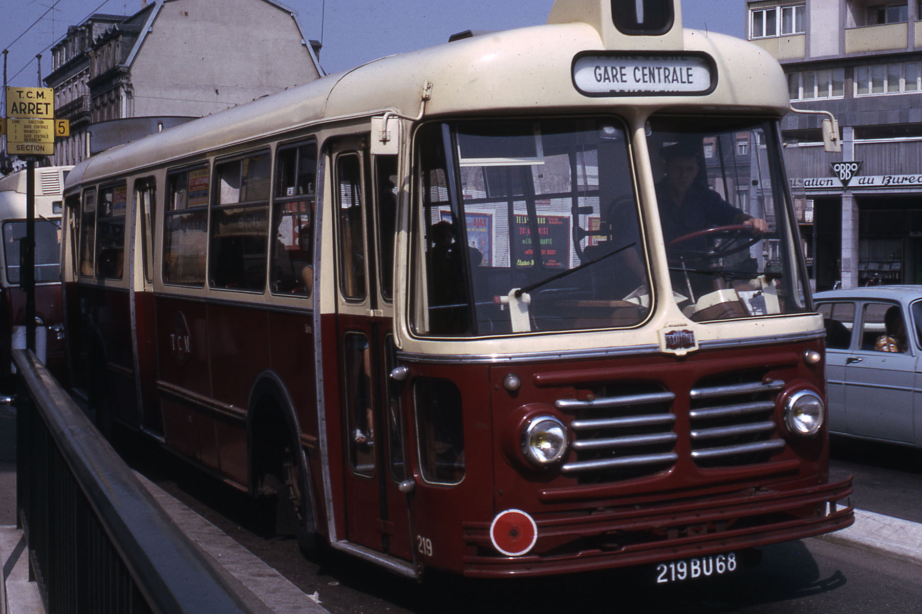 Bus Floirat de la TCM (Transport en commun de Mulhouse, devenue Soléa), près de la Porte Jeune à Mulhouse en 1966